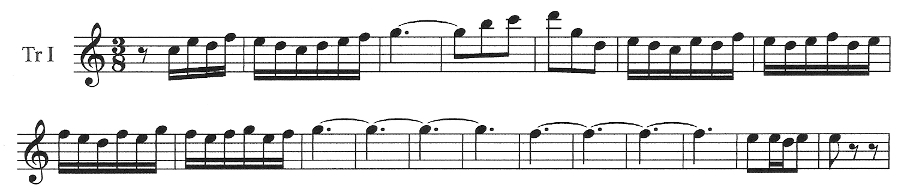 Die ersten Takte der 1. Tromba des Eingangschores der Kantate BWV 215